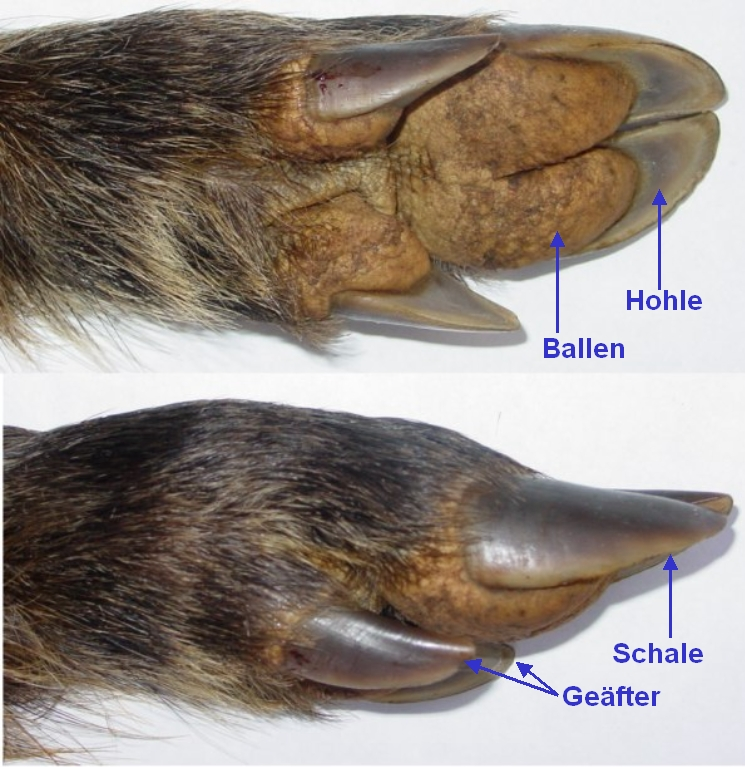 Vorderlauf des Europäischen Wildschweins Sus Scrofa.